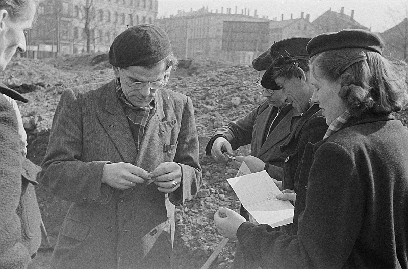 Original image description from the Deutsche FotothekAufbauhelfer beim Einkleben von Sammelmarken